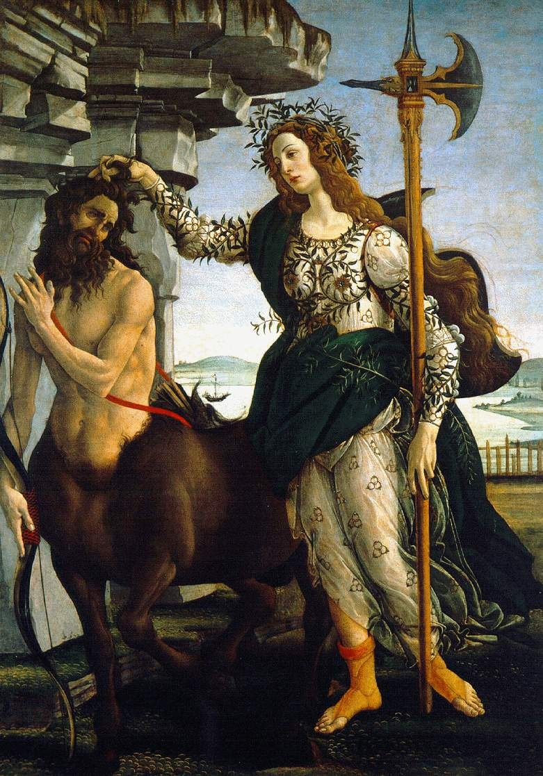 Pintura renacentista